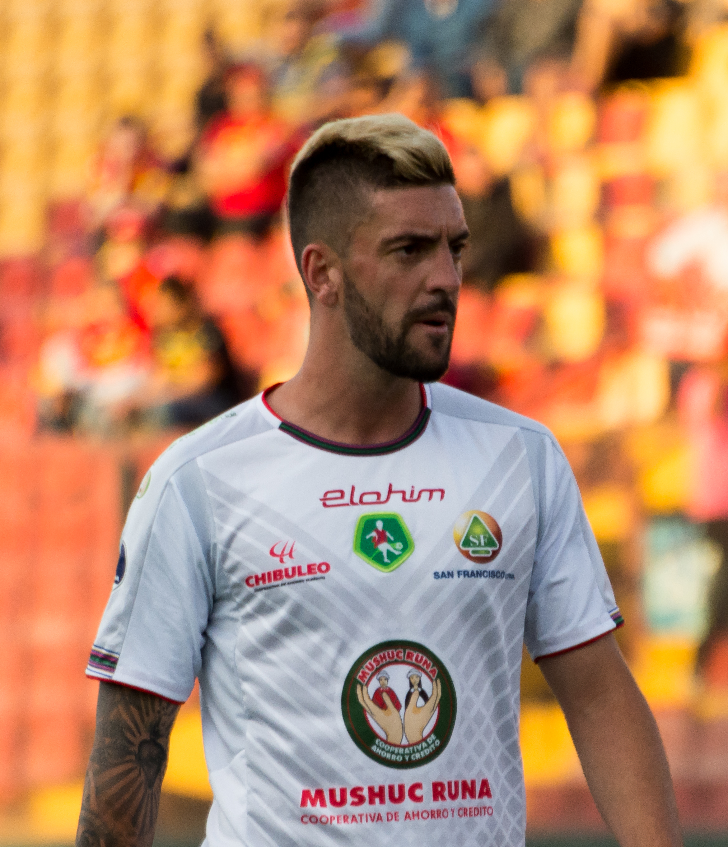 Alejandro Rébola, Unión Española v Mushuc Runa, Estadio Santa Laura, Independencia, Santiago, Región Metropolitana, Chile.